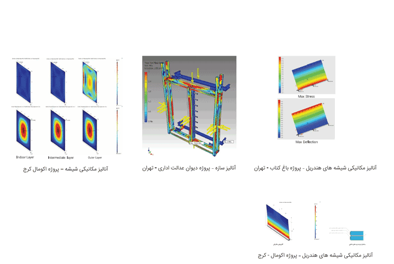 نرم افزار های متفاوتی برای تحلیل ساختار شیشه و مهندسی اجزا نما استفاده میگردد. در اینجا چند تحلیل از ساختار شیشه و سازه را میبینید.